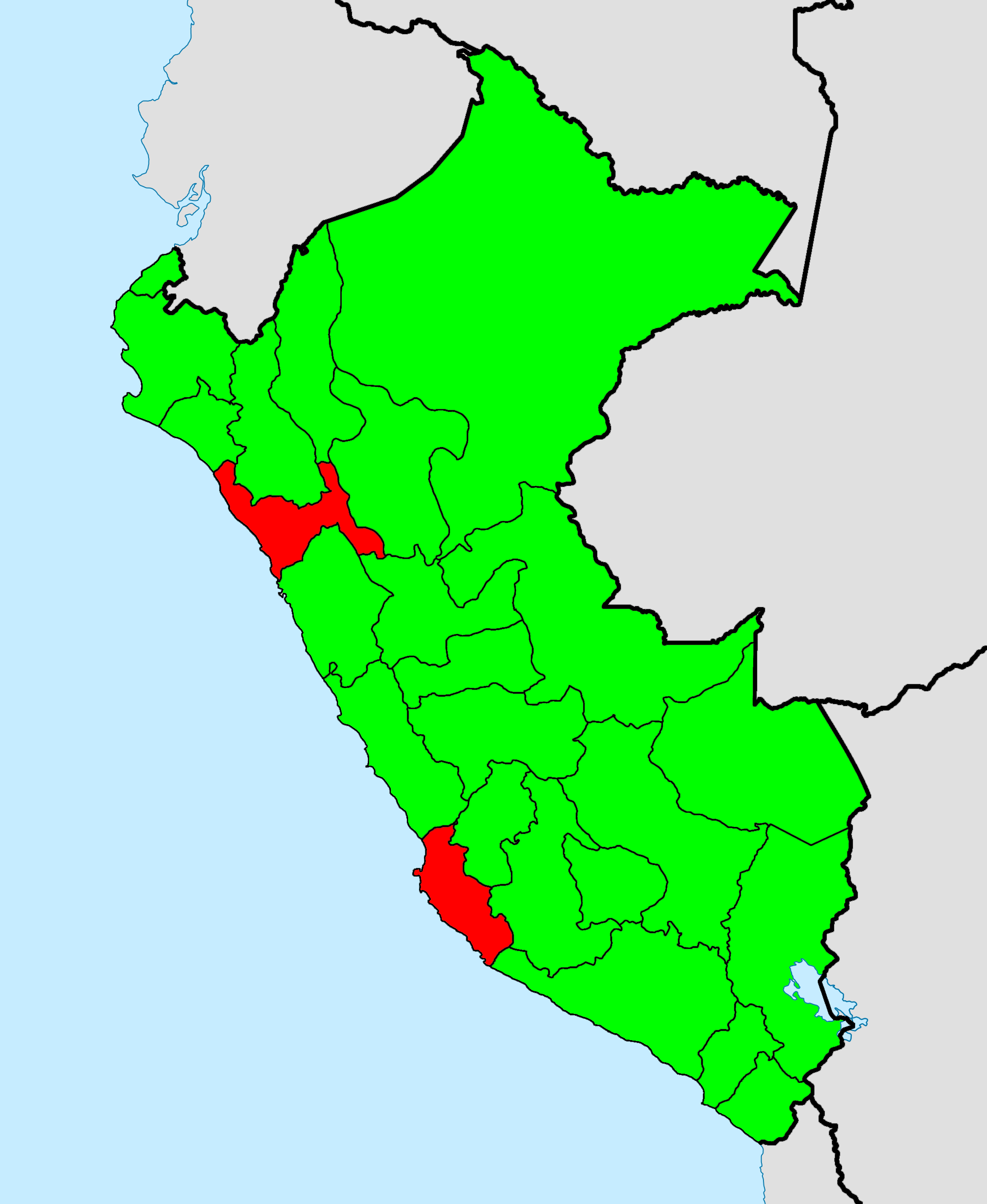 Candidato vencedor por departamento: en verde Peru Posible, en rojo APRA, según